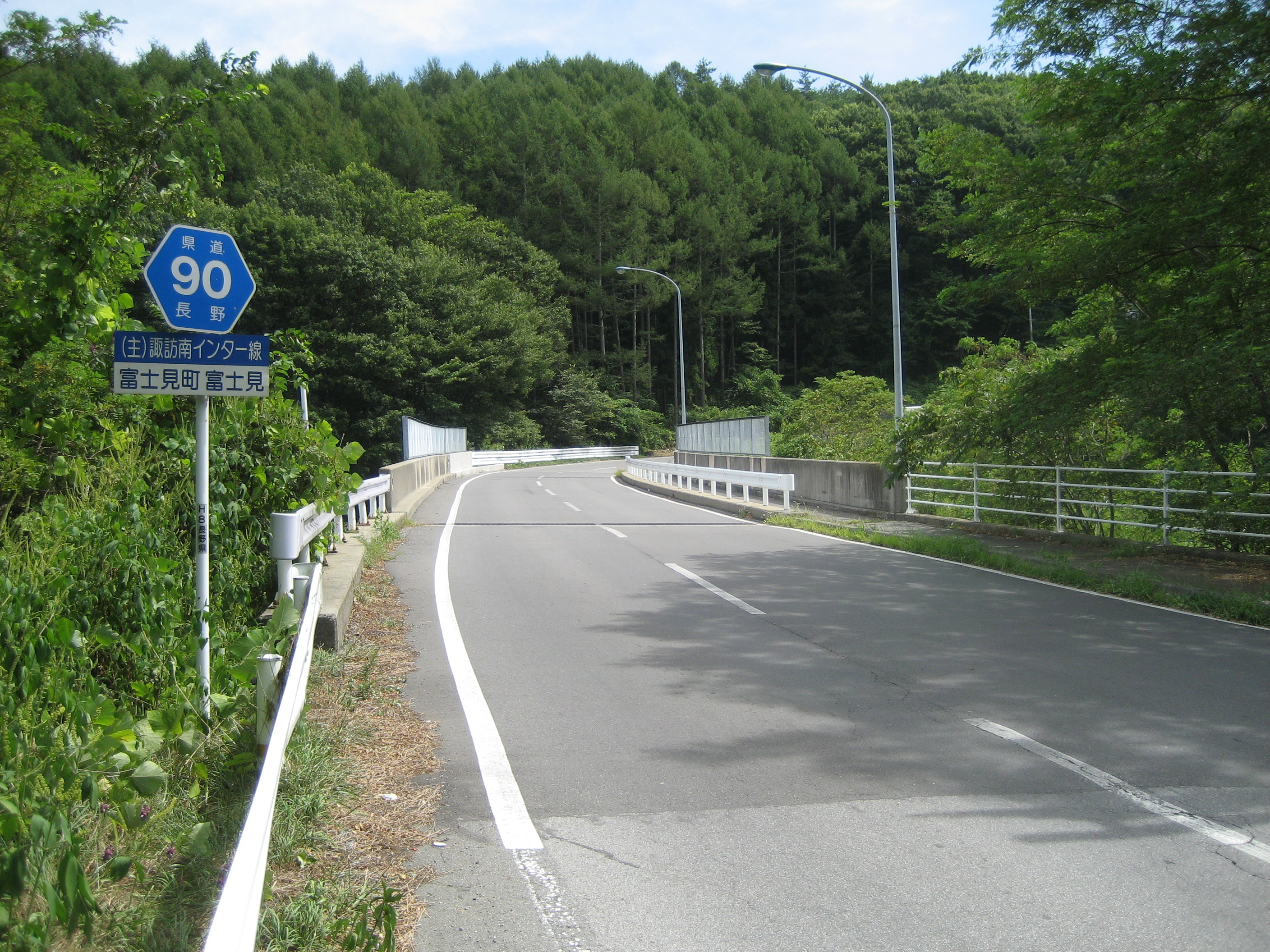 長野県道90号線富士見町富士見付近